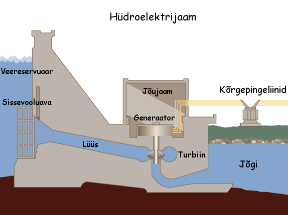 Tegemist on eesti keelde tõlgitud hüdroenergiajaama kujutava joonisega. Originaalpilt on Image:Hydroelectric_dam.png.This image is translated (into estonian language) version of image Image:Hydroelectric_dam.png.